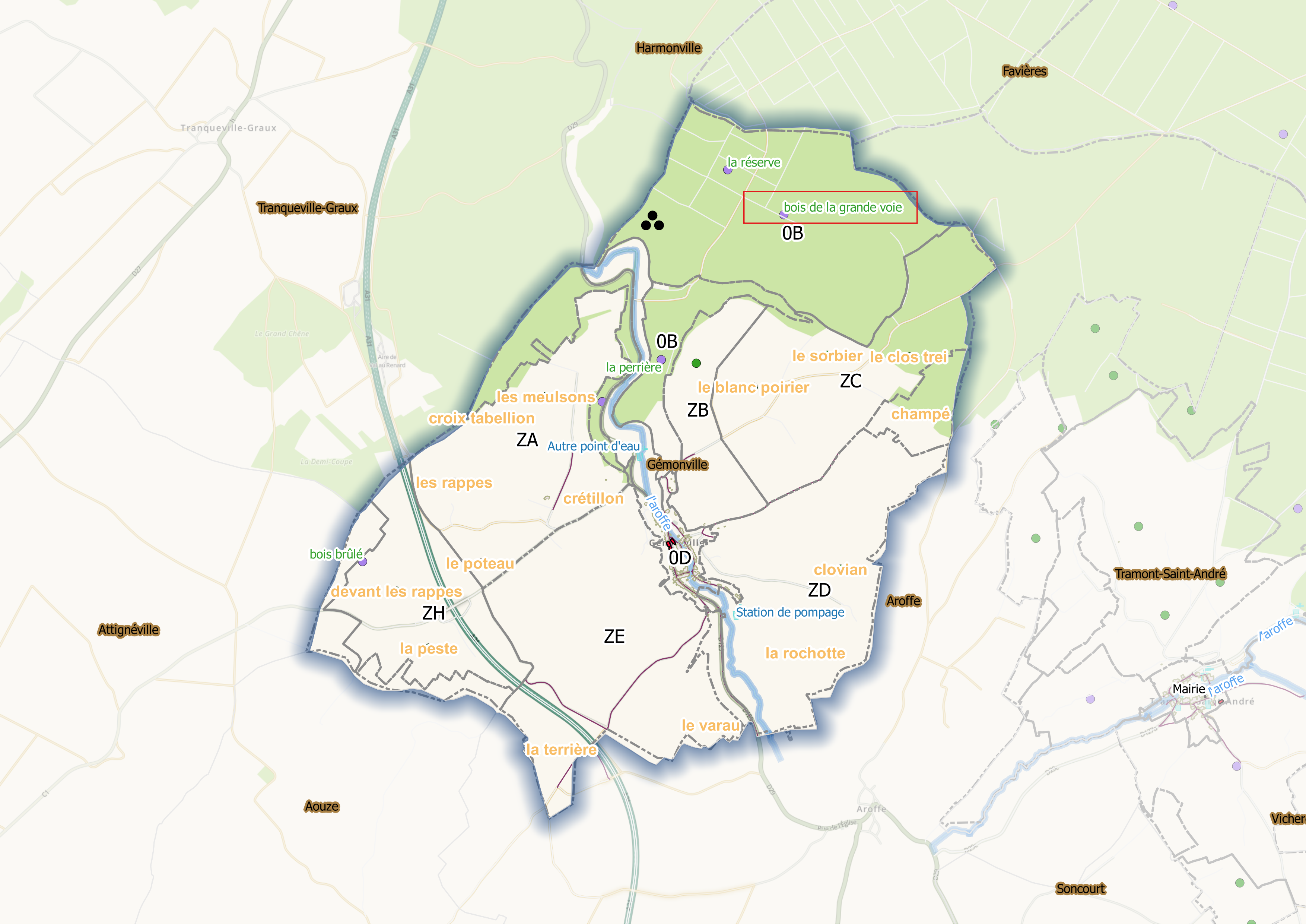 Qgis utilise la carte OSM et quelques reports cartographiques manuels (Toponymes, Sections cadastrales)